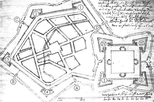 Jülich 1609 mit Nummern zur Bezeichnung der Festungswerke und Tore